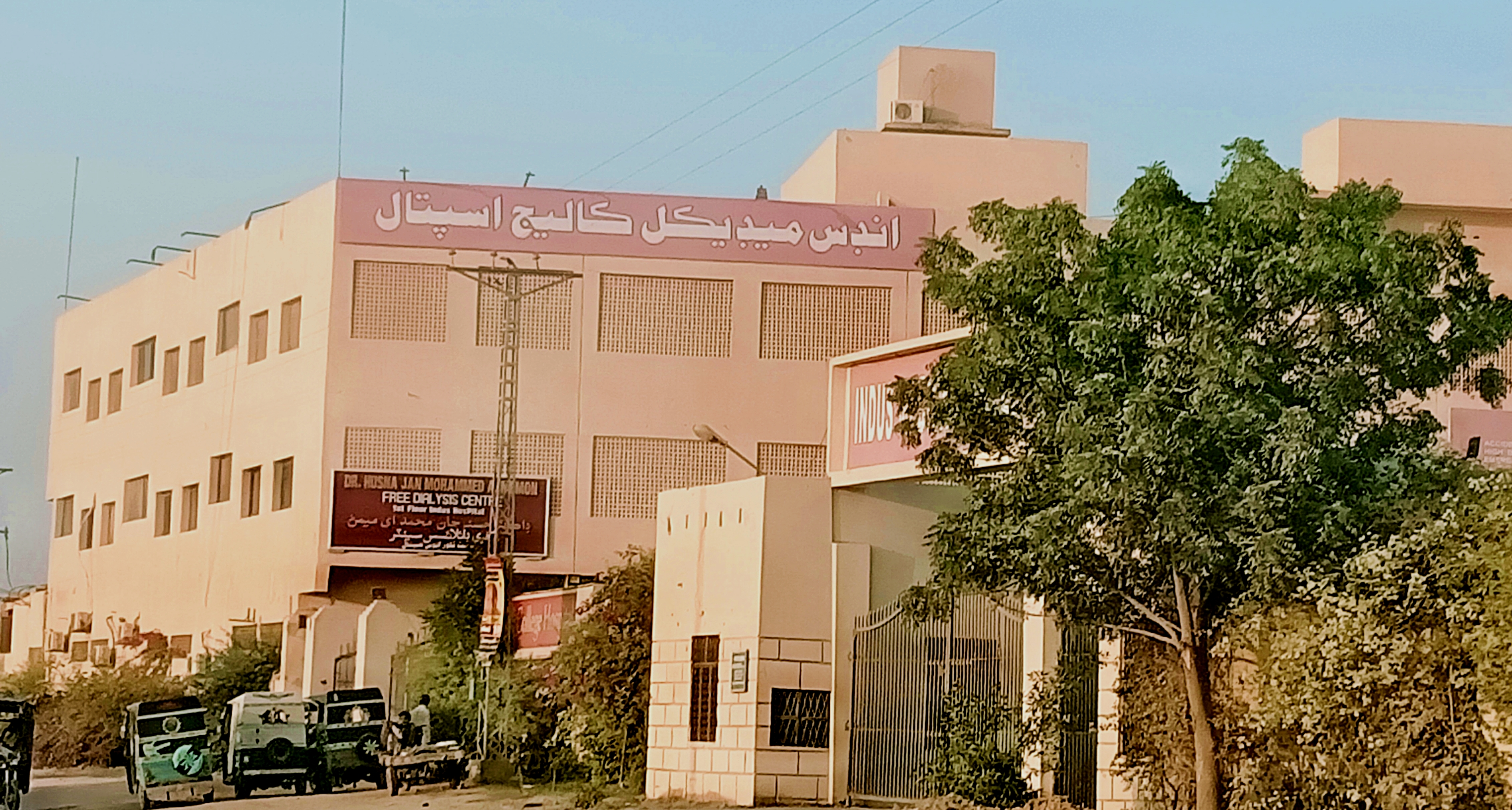 سنڌي: انڊس ميڊيڪل ڪاليج ھاسپيٽل ٽنڊومحمدخان